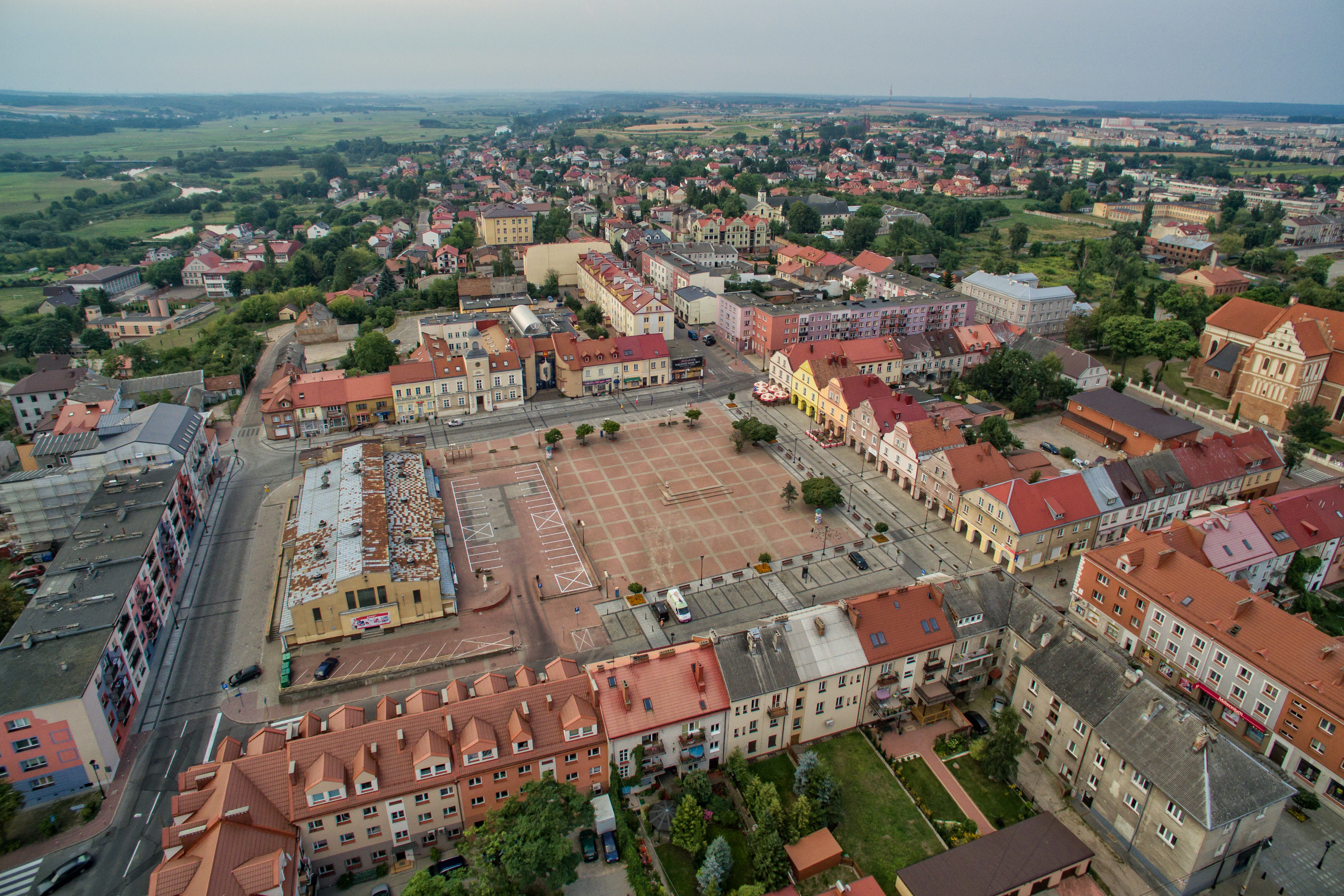 Łomża – rynek starego miasta oraz okolice